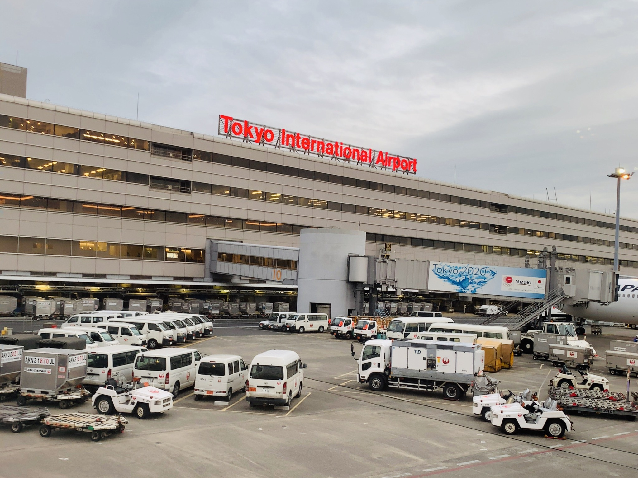 第１旅客ターミナル（エプロンから撮影）